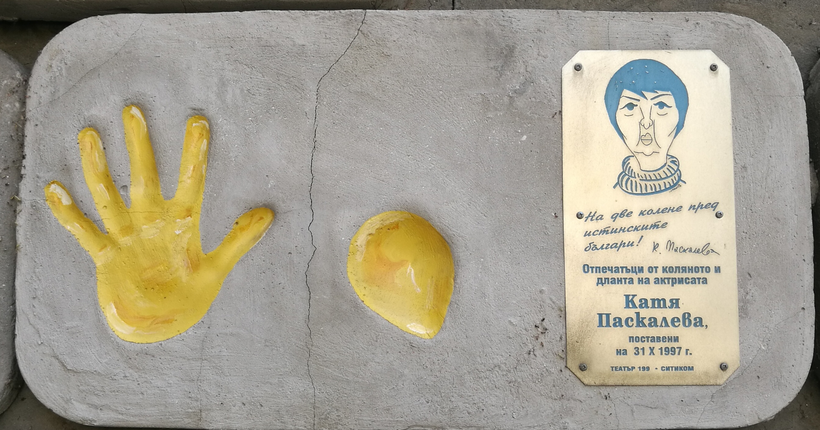 Стената на славата пред Театър 199 - пано с отпечатъци, послание и шарж на Катя Паскалева.